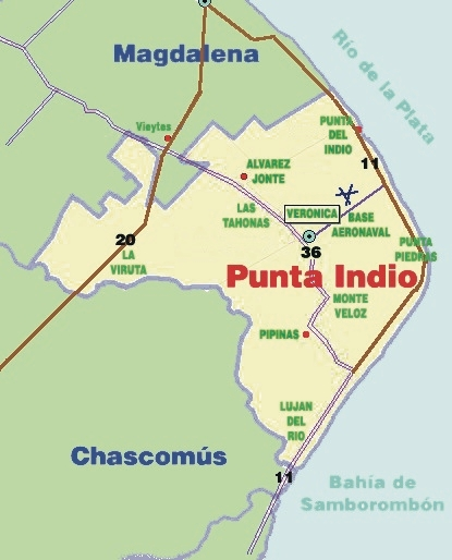 Mapa con las principales rutas y las localidades y parajes del Partido de Punta Indio.